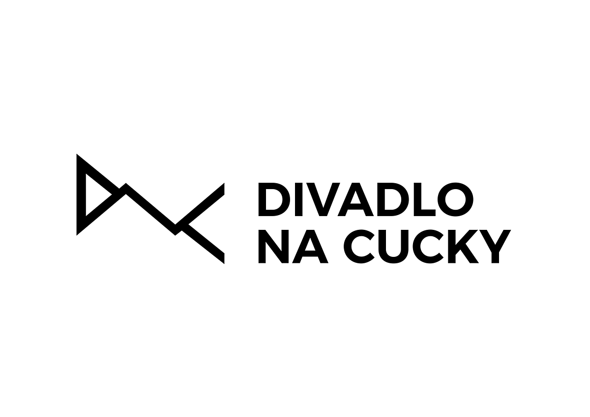 logo divadlo na cucky